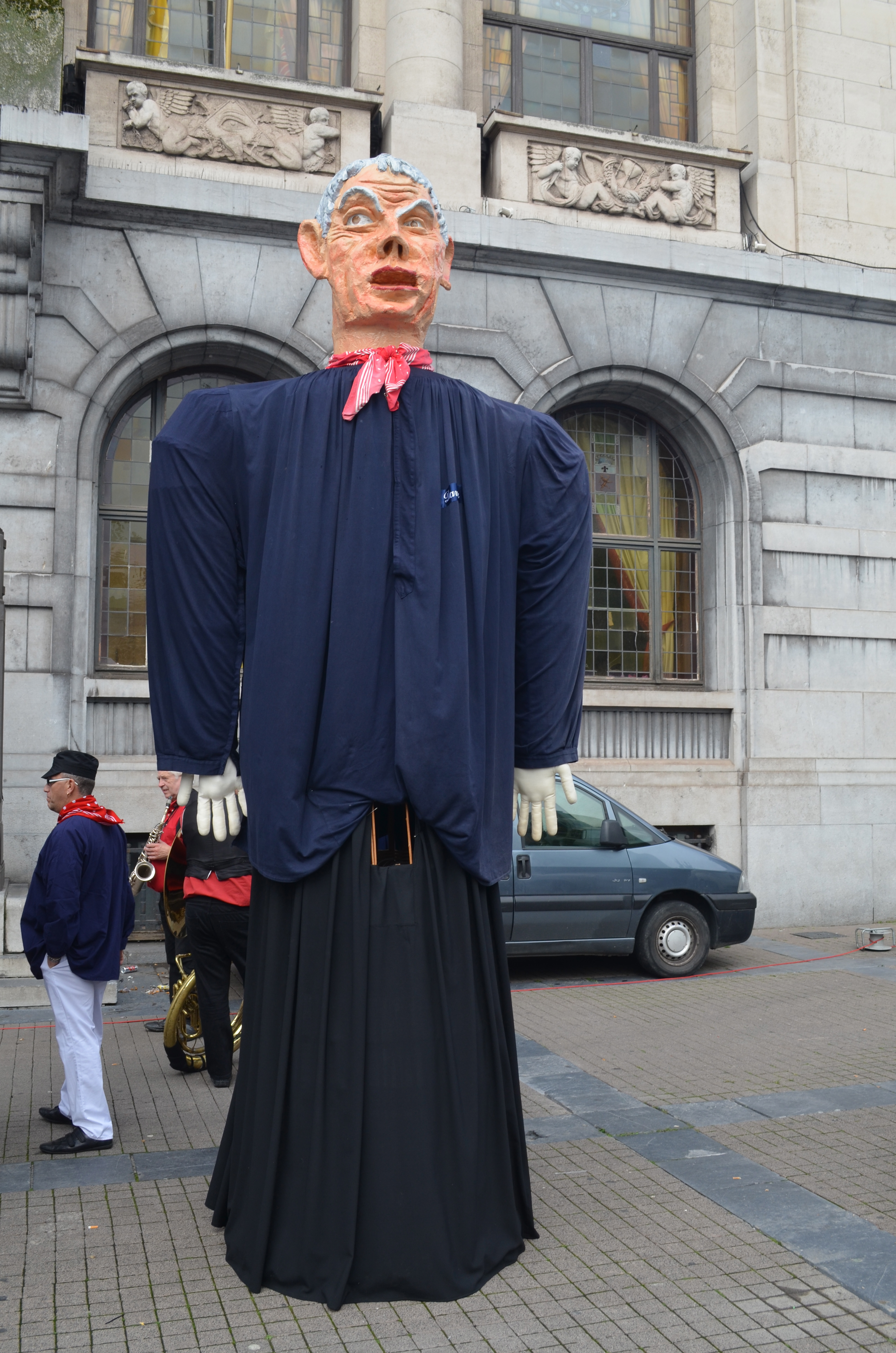 Davau : géant du folklore de Charleroi (Belgique) créé en l'honneur de Ferdinand Davaux.